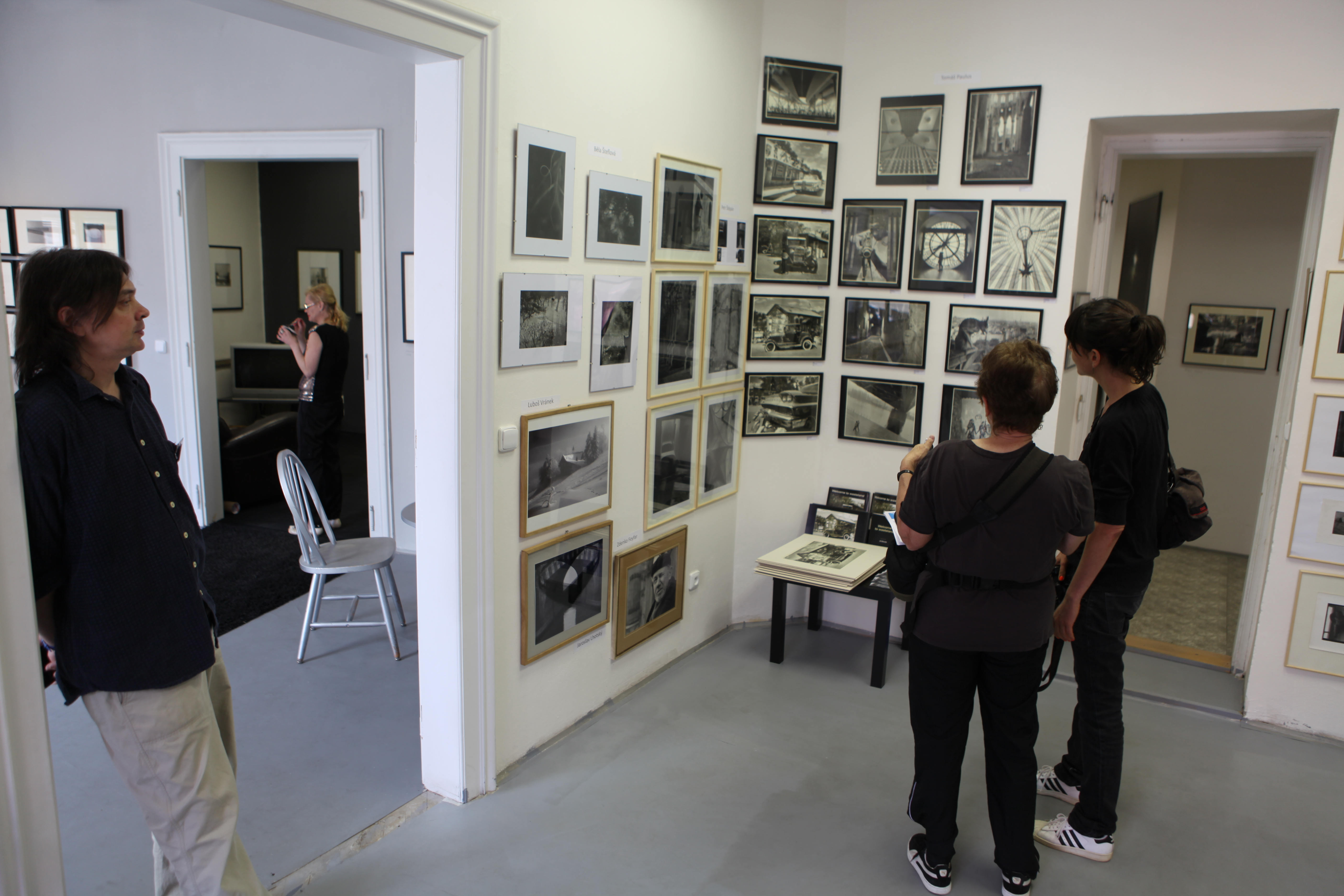 Osobnosti na festivalu Prague Photo 2013, foto: Vít Švajcr Dobré světlo.com. Karel Koutský